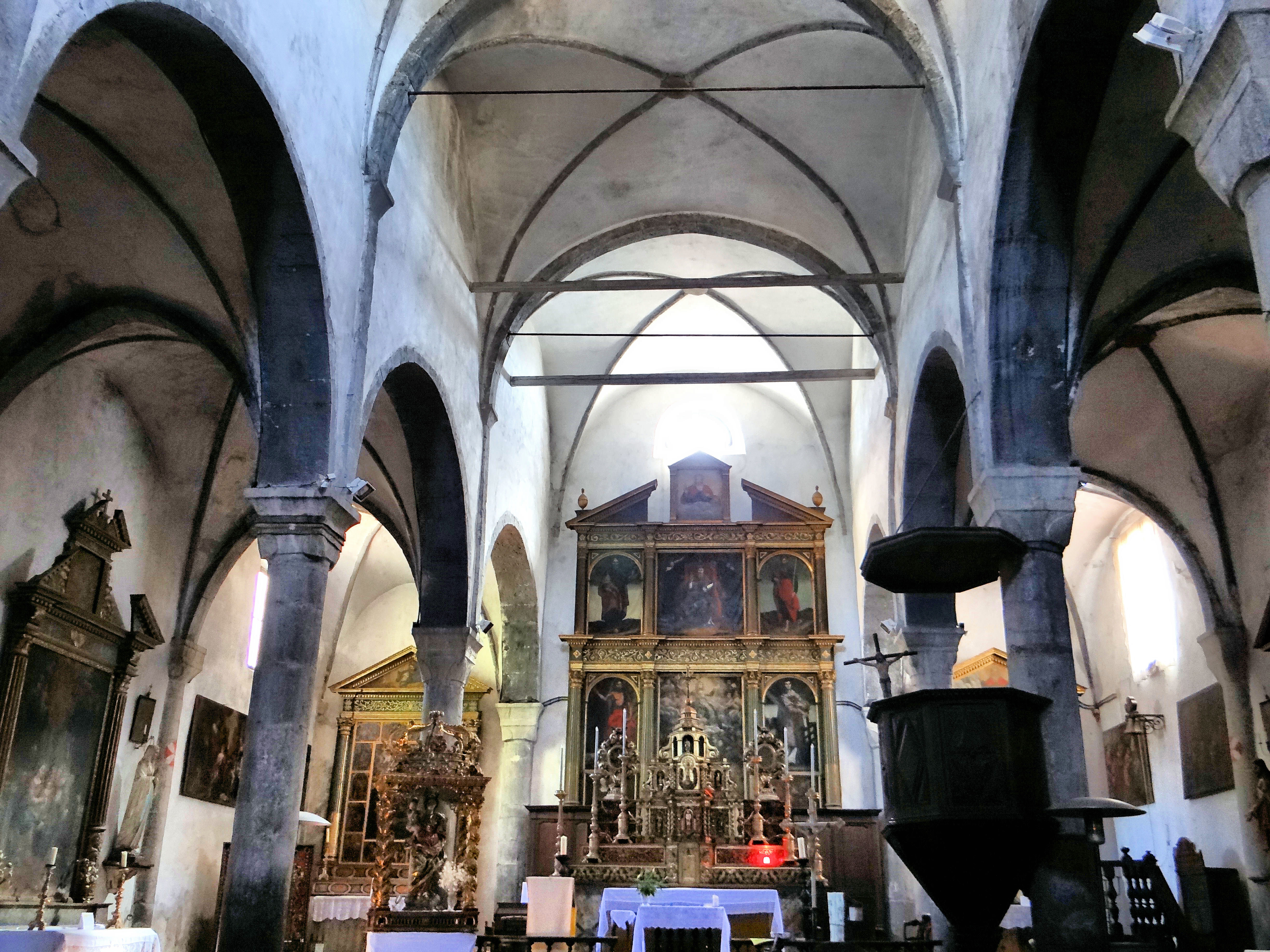 La Tour - Eglise Saint-Martin - Nef